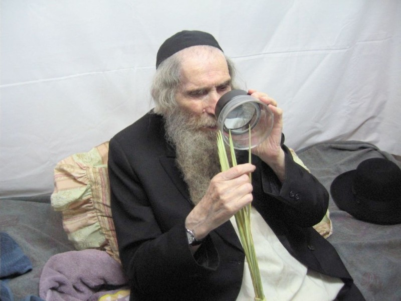 הרב שטיינמן בודק לולב